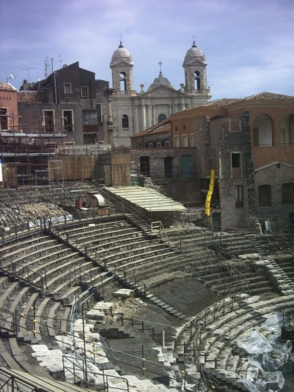 Estima-se que sua capacidade era de 7000 expectadores. Ainda existem escavaçoes arqueologicas no local. Apenas uma parte do teatro eh aberta a visitacao turistica. (ao fundo, a igreja de Sao Francisco)